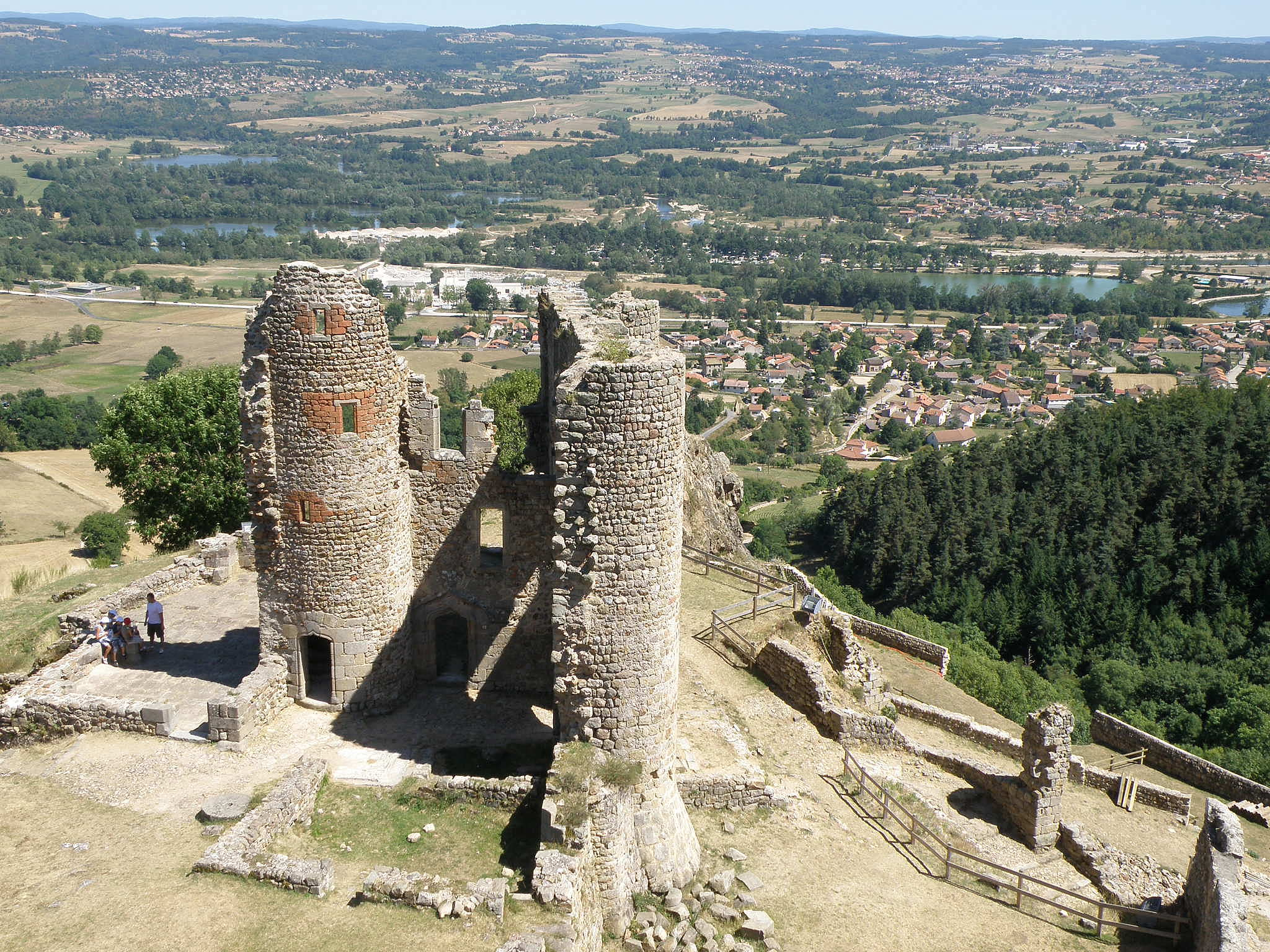 Bas-en-Basset, comm. de la Haute-Loire, France (région Auvergne). Château de Rochebaron dominant la vallée de la Loire près de Bas-en-Basset. La partie nord (Saint-Julien) de la localité est visible en contrebas à droite. Un peu au-delà, à droite, bassin de la station d'épuration. Derrière, on distingue (difficilement) la Loire, plus mince, coulant de droite à gauche, mais décrivant, vers le milieu de la photo, une courbe, par quoi son cours se situe, à gauche sur la photo, derrière les étangs. En face de Bas-en-Basset, sur la rive opposée de la Loire, le village de Basset.